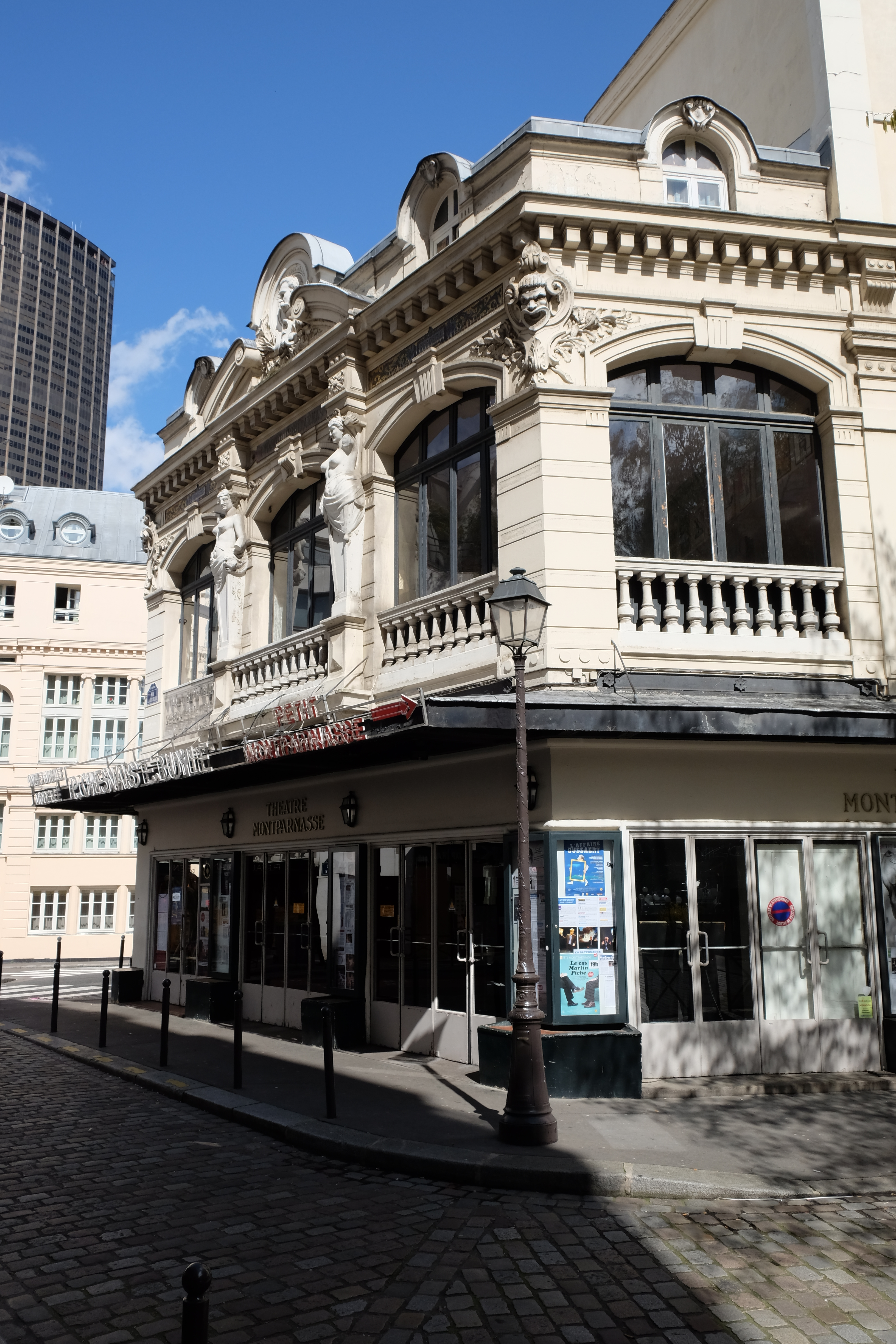 Théâtre Montparnasse - Paris XIV